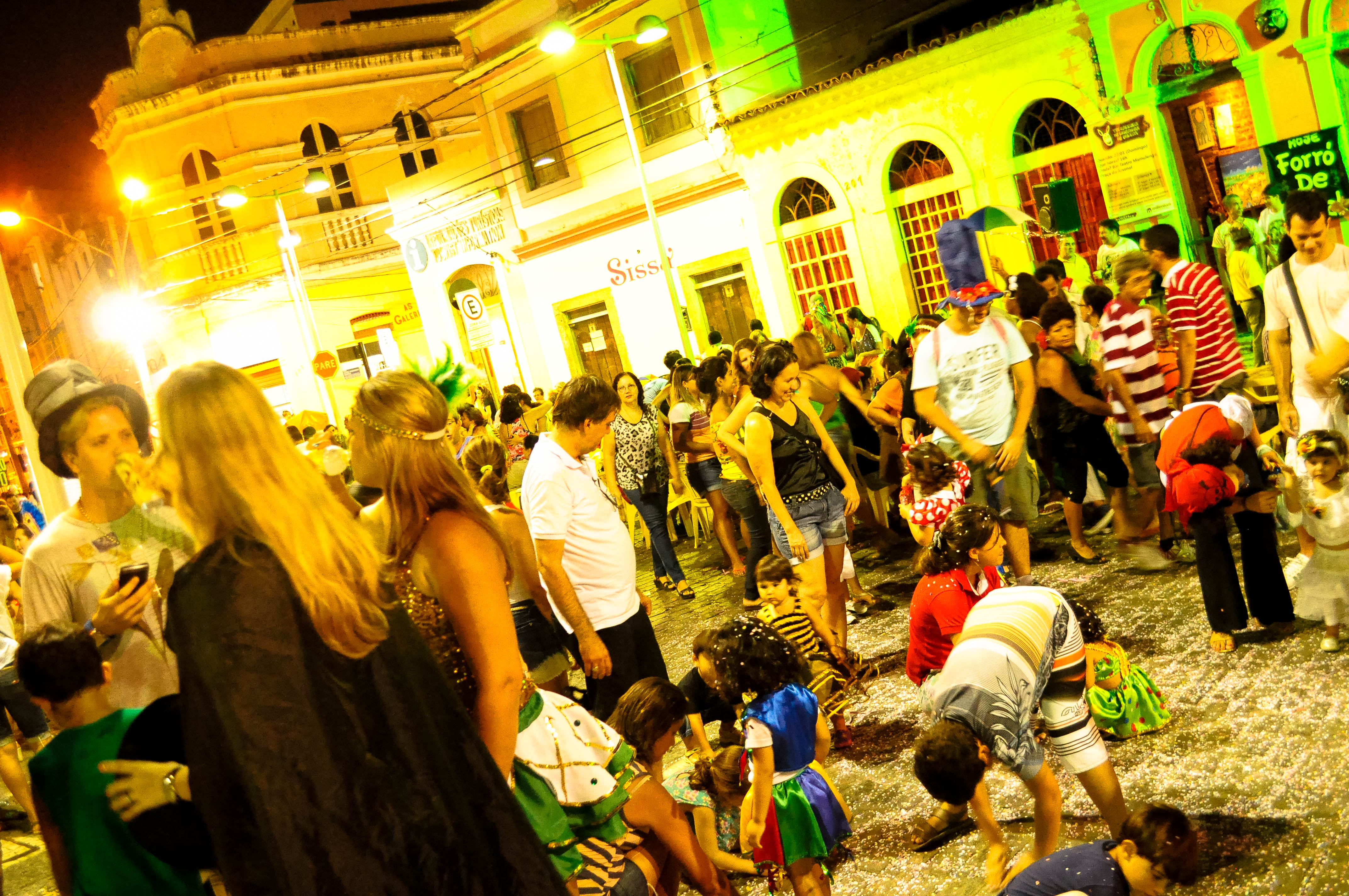 Prévias do Carnaval 2013 - Recife, Pernambuco, Brasil